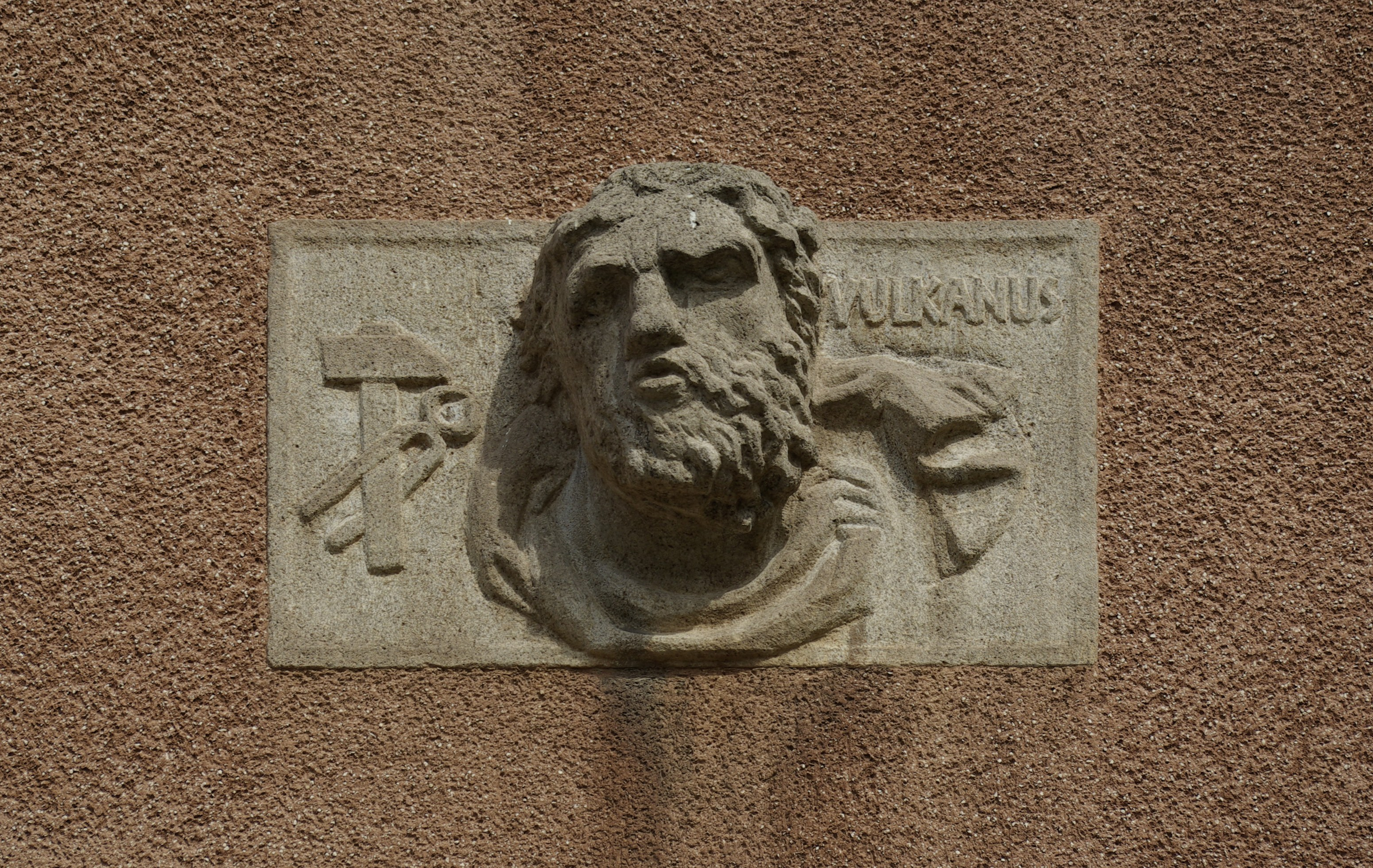 Vulkanus-Relief von Joseph Wackerle am Himbeerpalast in Erlangen